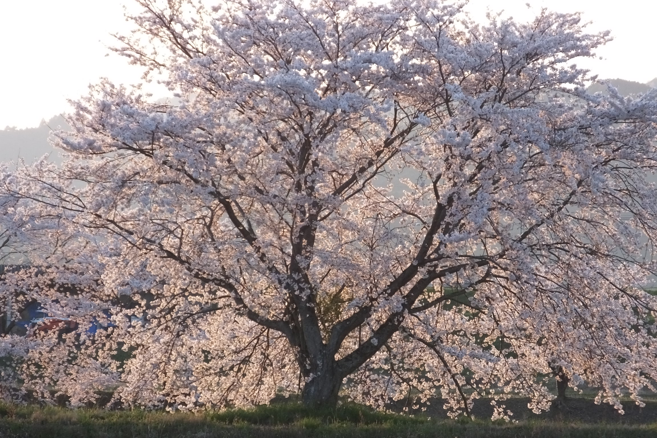 2020-04-07 Prunus × yedoensis Tambasasayama,Hyogo(丹波篠山市篠山川のソメイヨシノ)